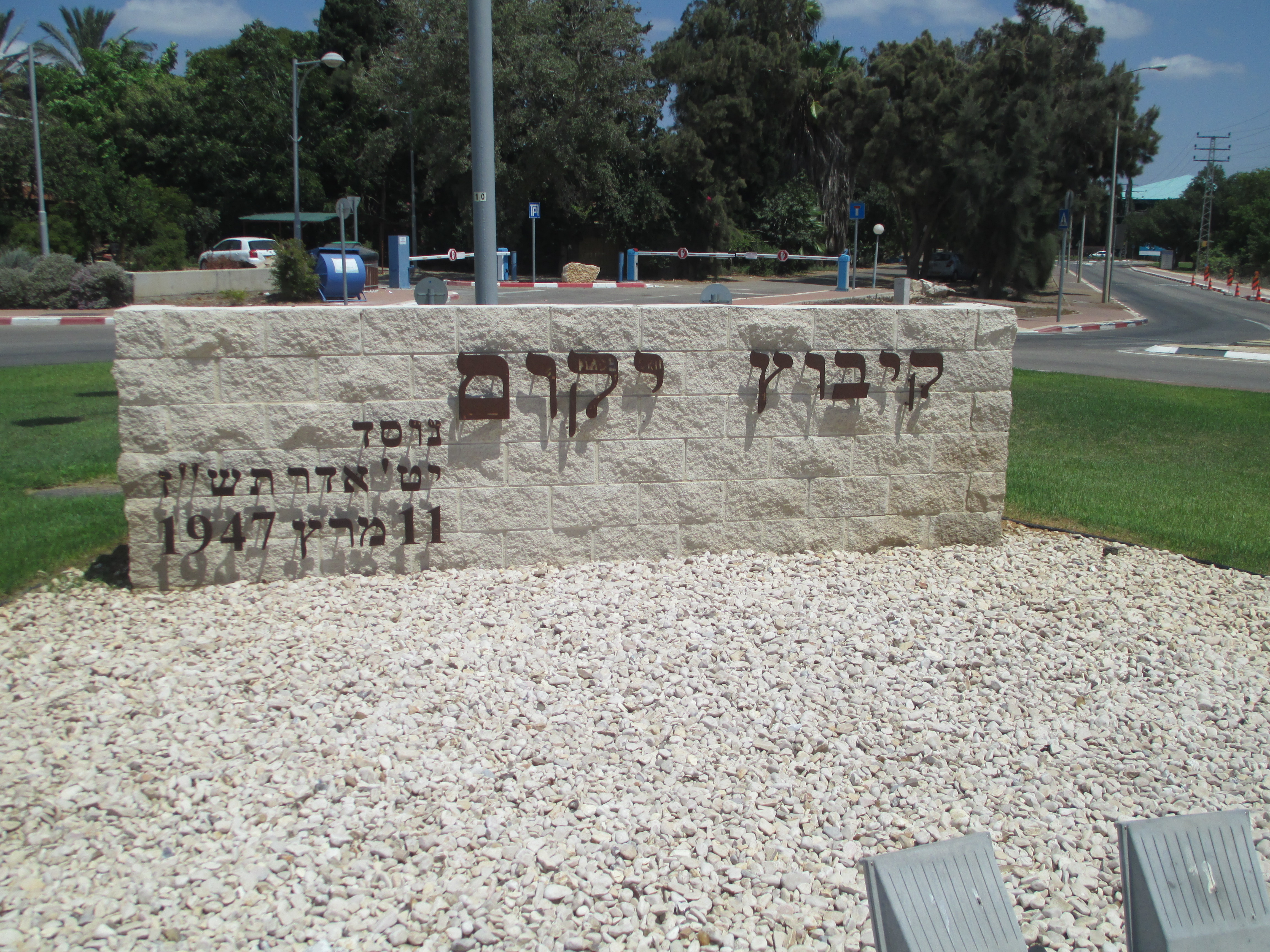 כניסה לקיבוץ יקום